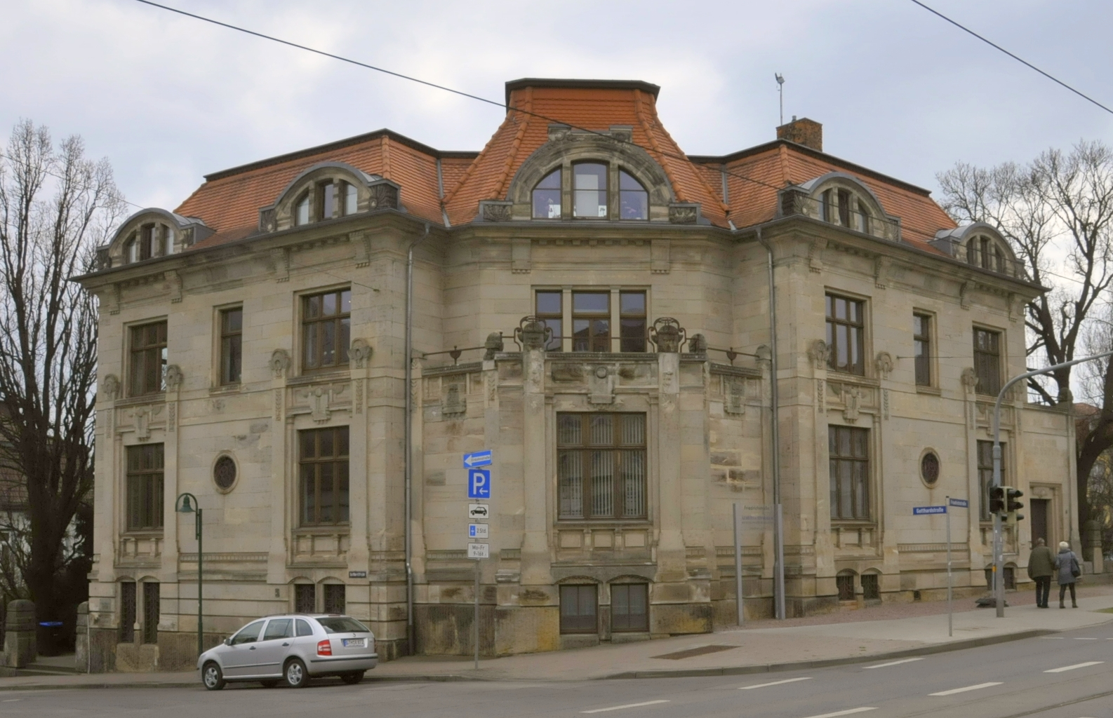 Gotha, Friedrichstr. 1